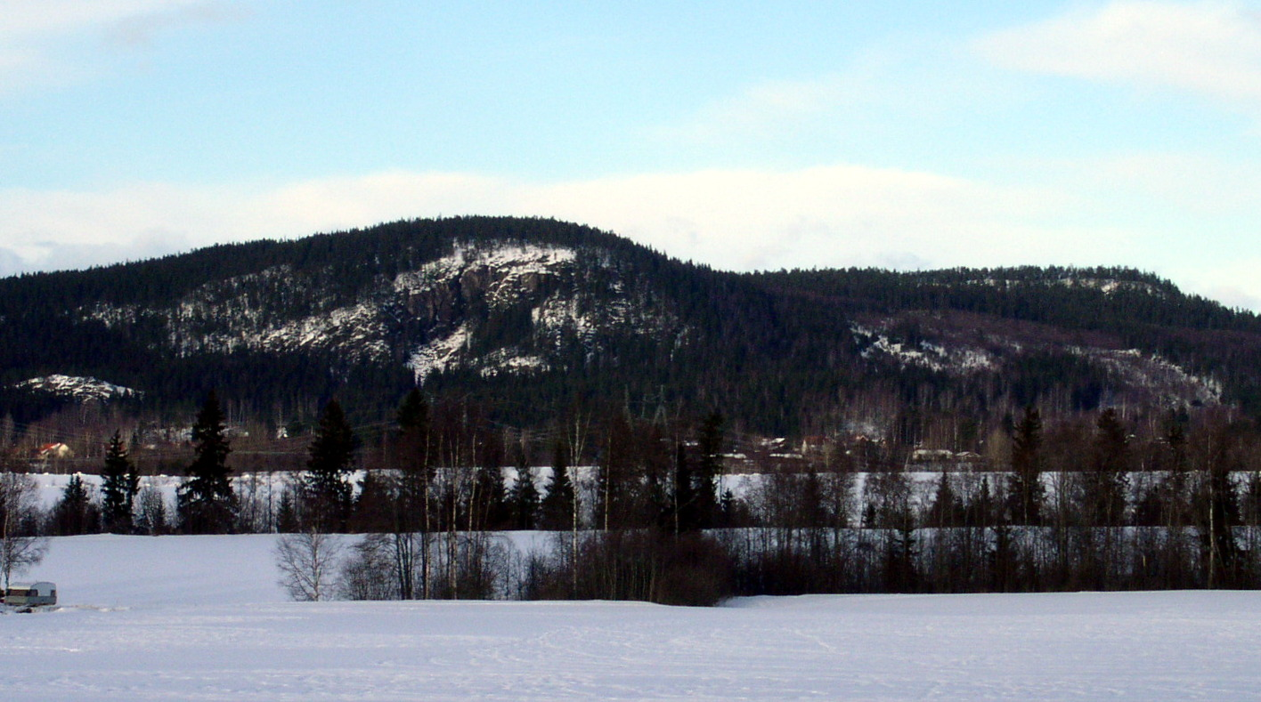 Djurmo klack, Gagnefs kommun, Dalarna